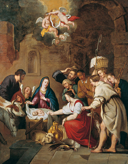 Italy